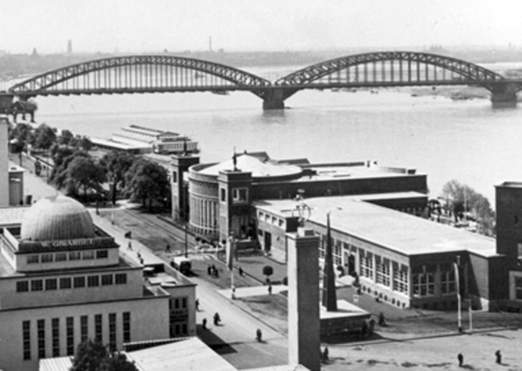 GeSoLei: Blick auf die Rheinterrasse, welche von Beginn an für die Gastronomie ausgerichtet war. Zur GeSoLei stand sie mit mehreren Restaurants und Cafés den Ausstellungsbesuchern offen: Die damals 450 Mitarbeiter servierten täglich bis zu 4.000 Essen.